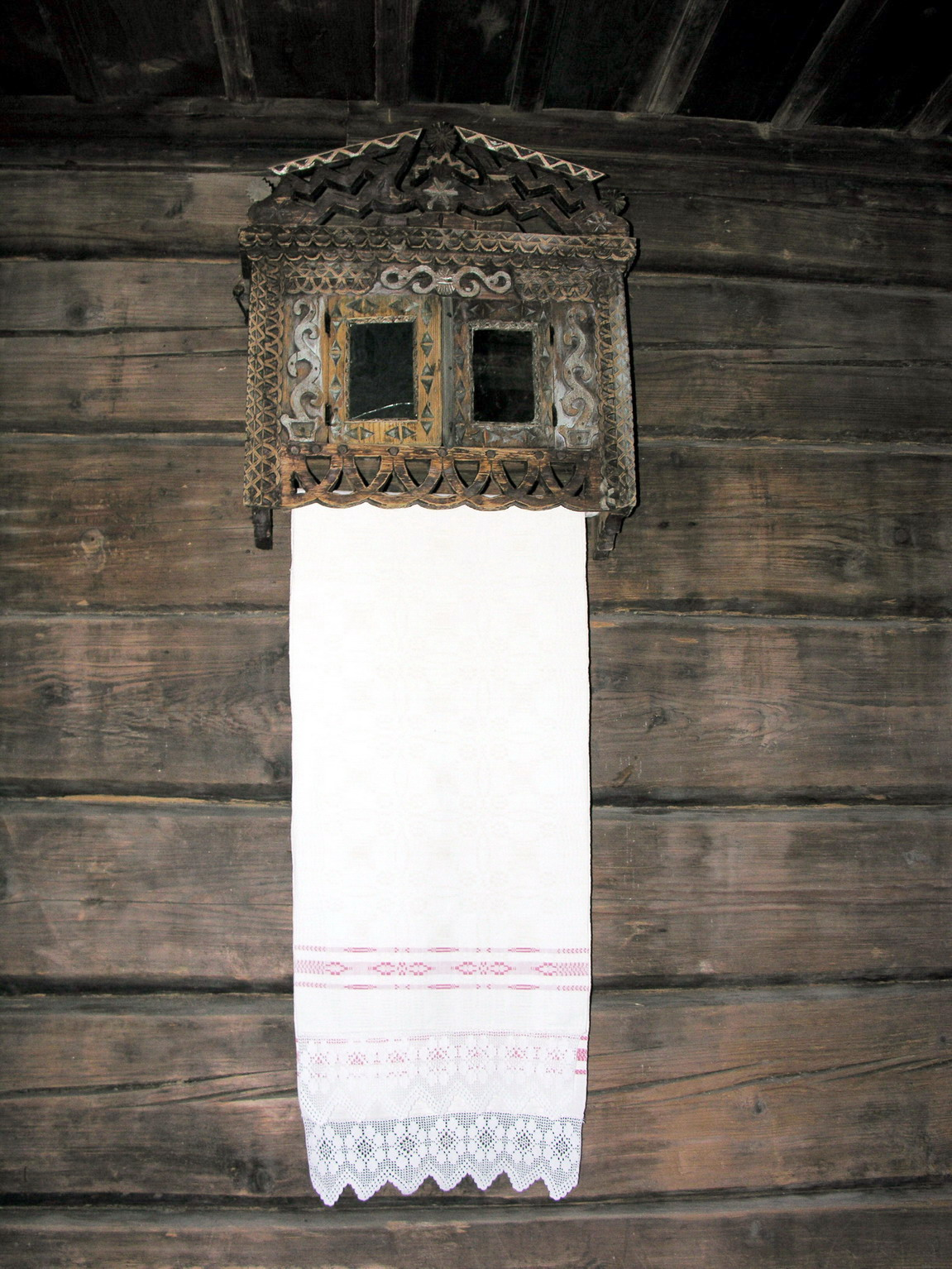 Rankšluostinė 2007-04-21, Lietuva